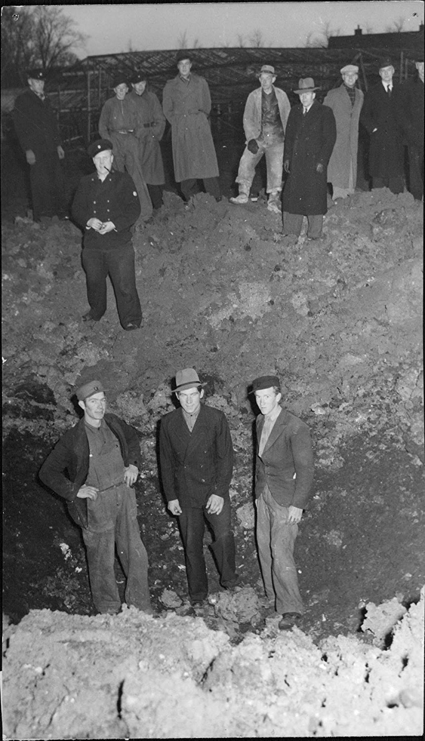 Baksidestext: "Bombanfallet mot Lund. På bilden synes den stora kratern efter minbomben." Enligt anteckning publicerad (i Svenska Dagbladet?) den 21 november 1943.